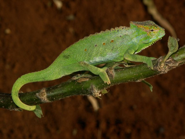 Chamaeleo wiedersheimi